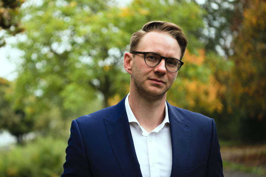 Martin Röckert